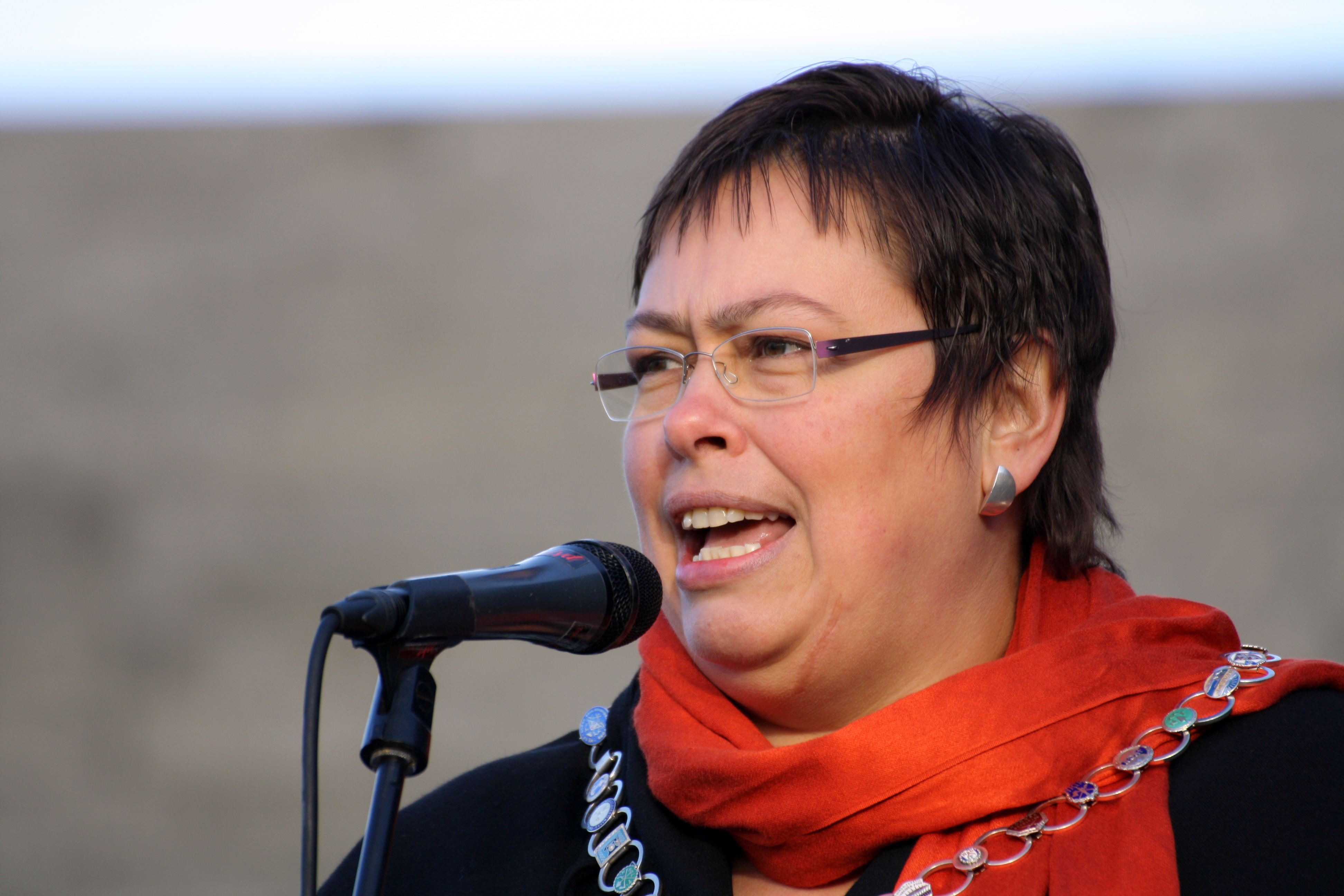 Ordfører Rita Ottervik holdt åpningstale.